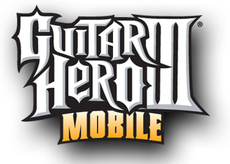 Logotipo oficial del videojuego Guitar Hero III Mobile, parte de la serie para teléfonos móviles Guitar Hero Mobile.